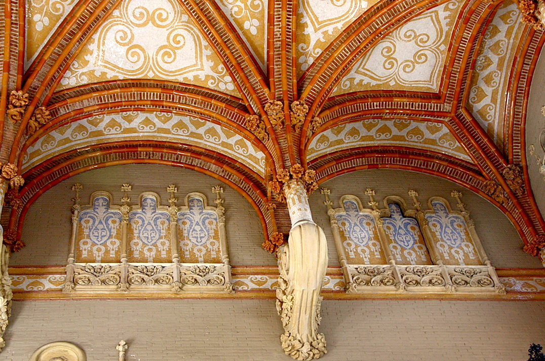 Volta de l'escala d'honor de l'hospital de Sant Pau (Barcelona, Catalunya), obra modernista de 1905. El disseny és de l'arquitecte Lluís Domènech i Montaner, el mosaic va ser dissenyat i confeccionat per Mario Maragliano.